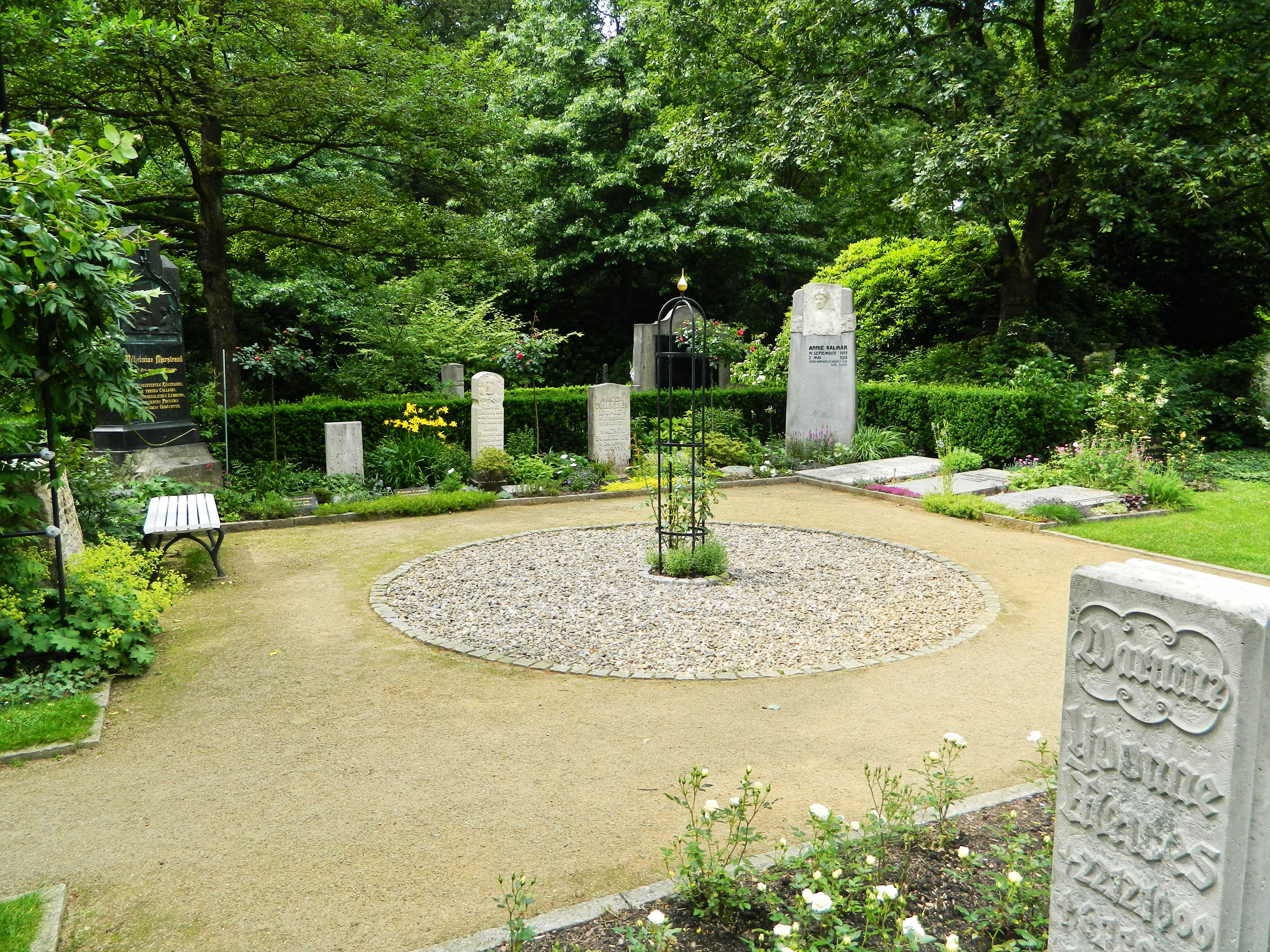 Garten der Frauen (Ort der Erinnerung an bedeutende Frauen)